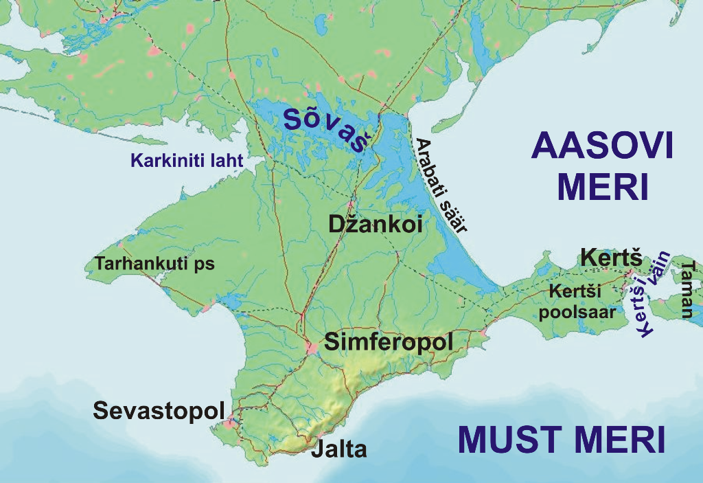 Krimmi poolsaare kaart